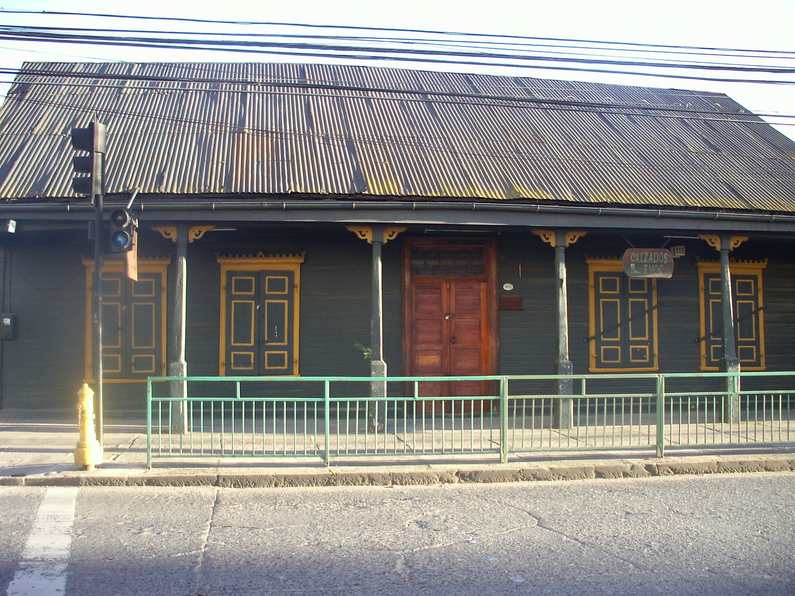 Casa de Conrado Stückrath, ubicada en Mackenna #1095 en el centro de Osorno This is a photo of a national monument in Chile: 718